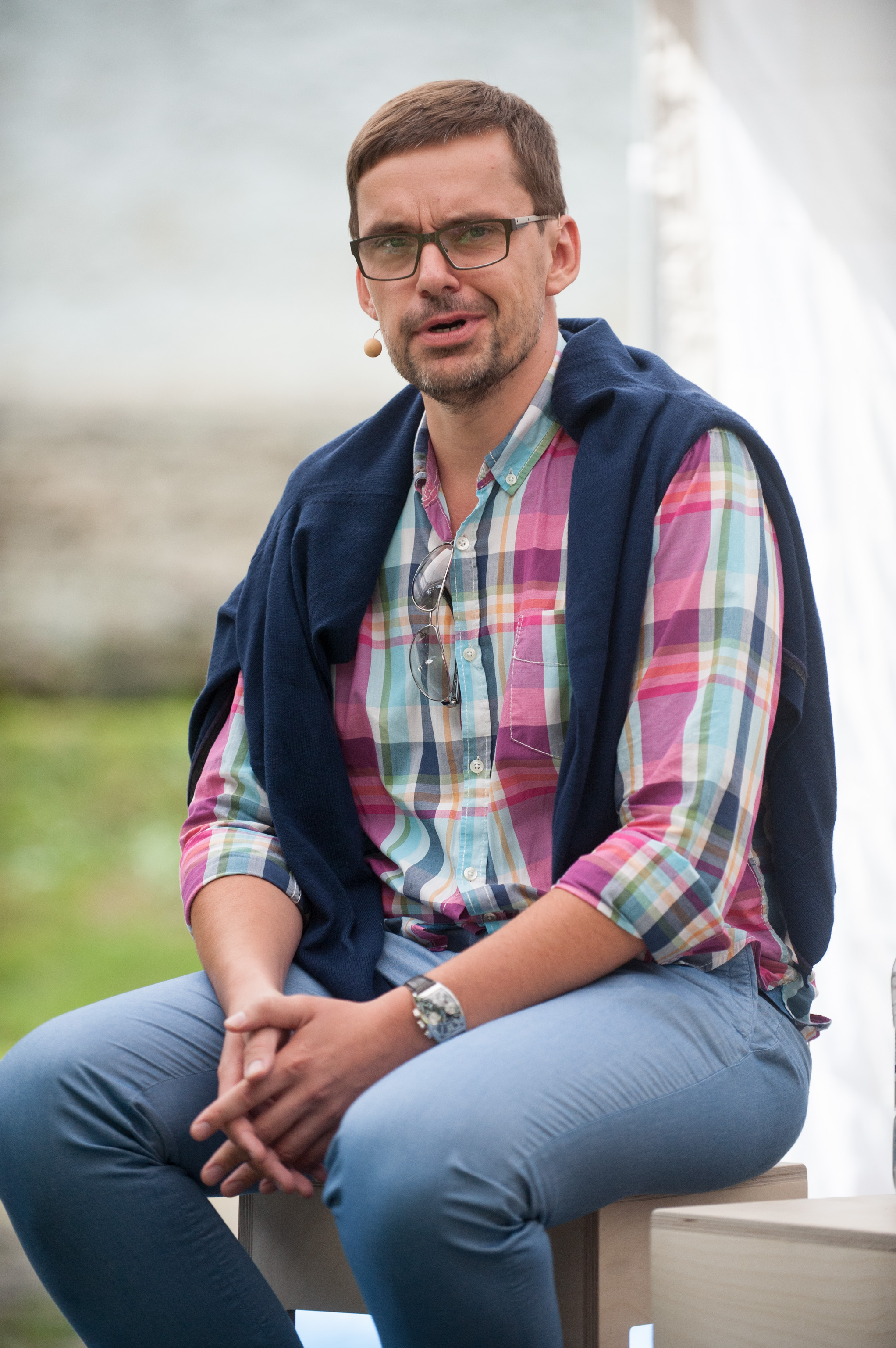 Arvamusfestival 2014: "Mis on riigi roll ettevõtluses?"